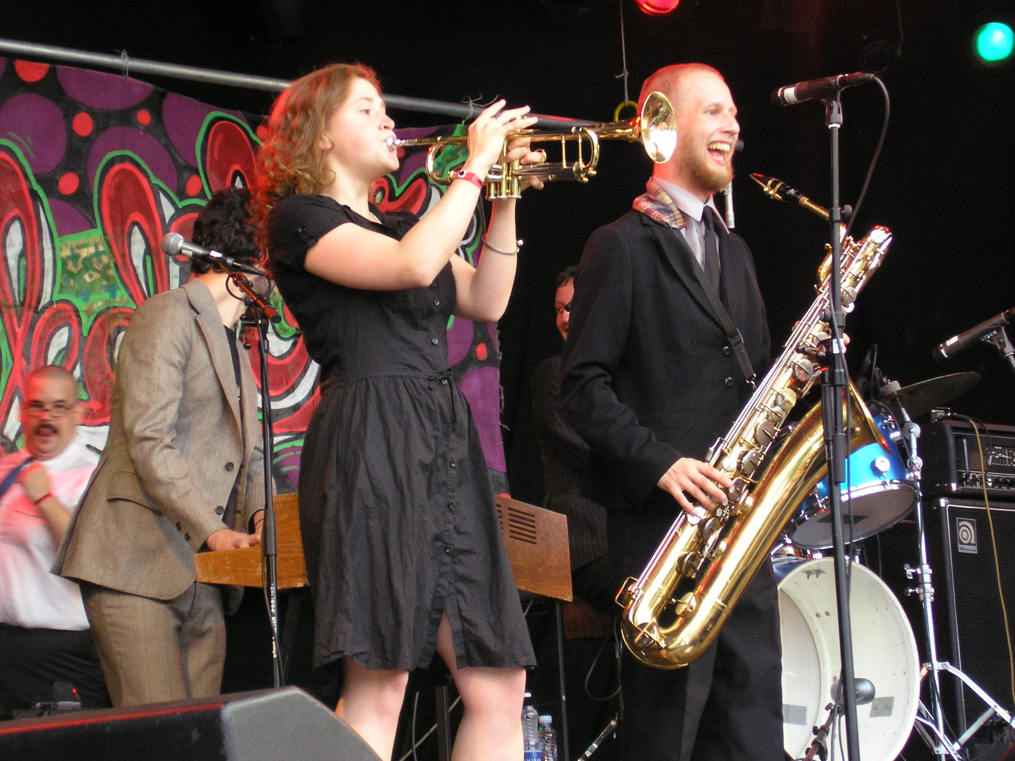 Eskalator playing at Augustibuller 2007.